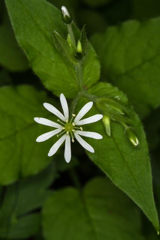 Hain-Sternmiere (Stellaria_nemorum) am_Naturlehrweg_Seebachtal (1300 m ü. M.)